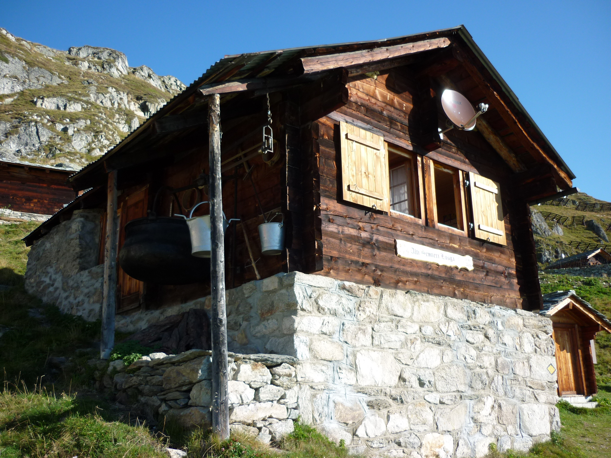 Alte Sennerei, Belalp, Naters VS, Schweiz